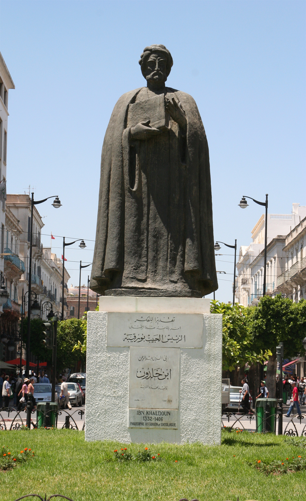 Statue d'Ibn Khaldoun sur l'avenue Habib Bourguiba à Tunis (Tunisie)